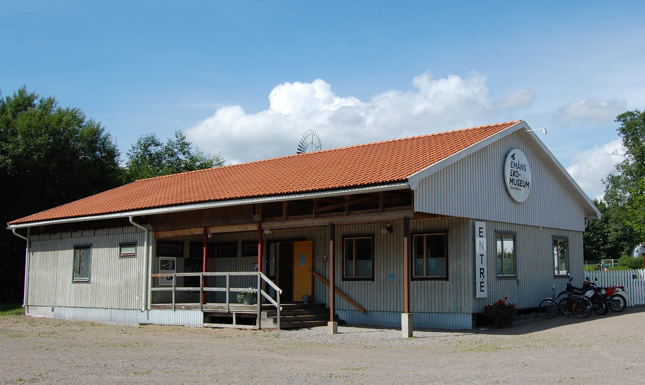 Ekomuseum Eman, Eingangsgebäude